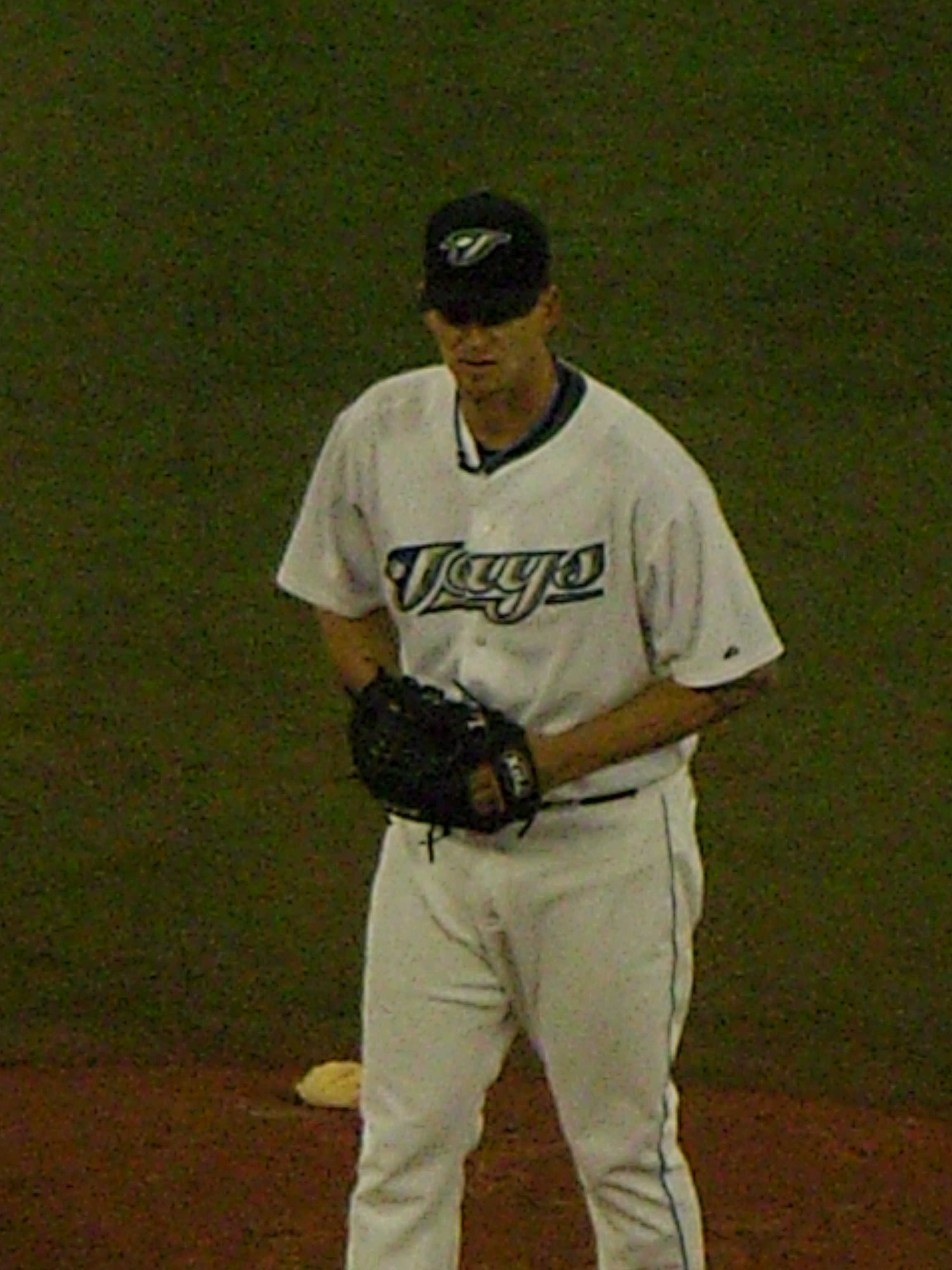 A. J. Burnett vs. L.A. Angels